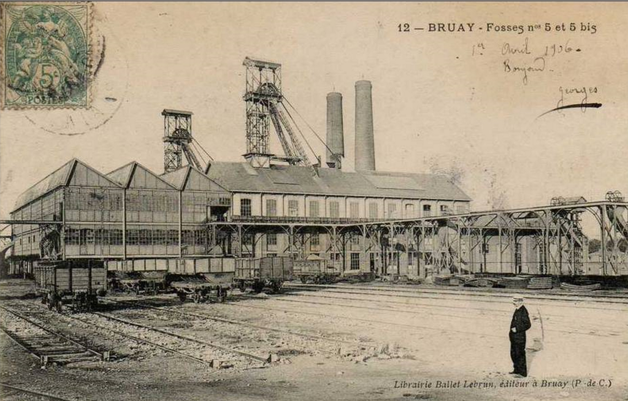 La Fosse n° 5 - 5 bis de la Compagnie des mines de Bruay était un charbonnage constitué de deux puits situé à Divion, Pas-de-Calais, Nord-Pas-de-Calais, France. Le puits d'aérage n° 5 ter était situé sur un autre carreau à Divion